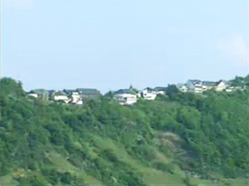 Blick von Starkenburg an der Mosel